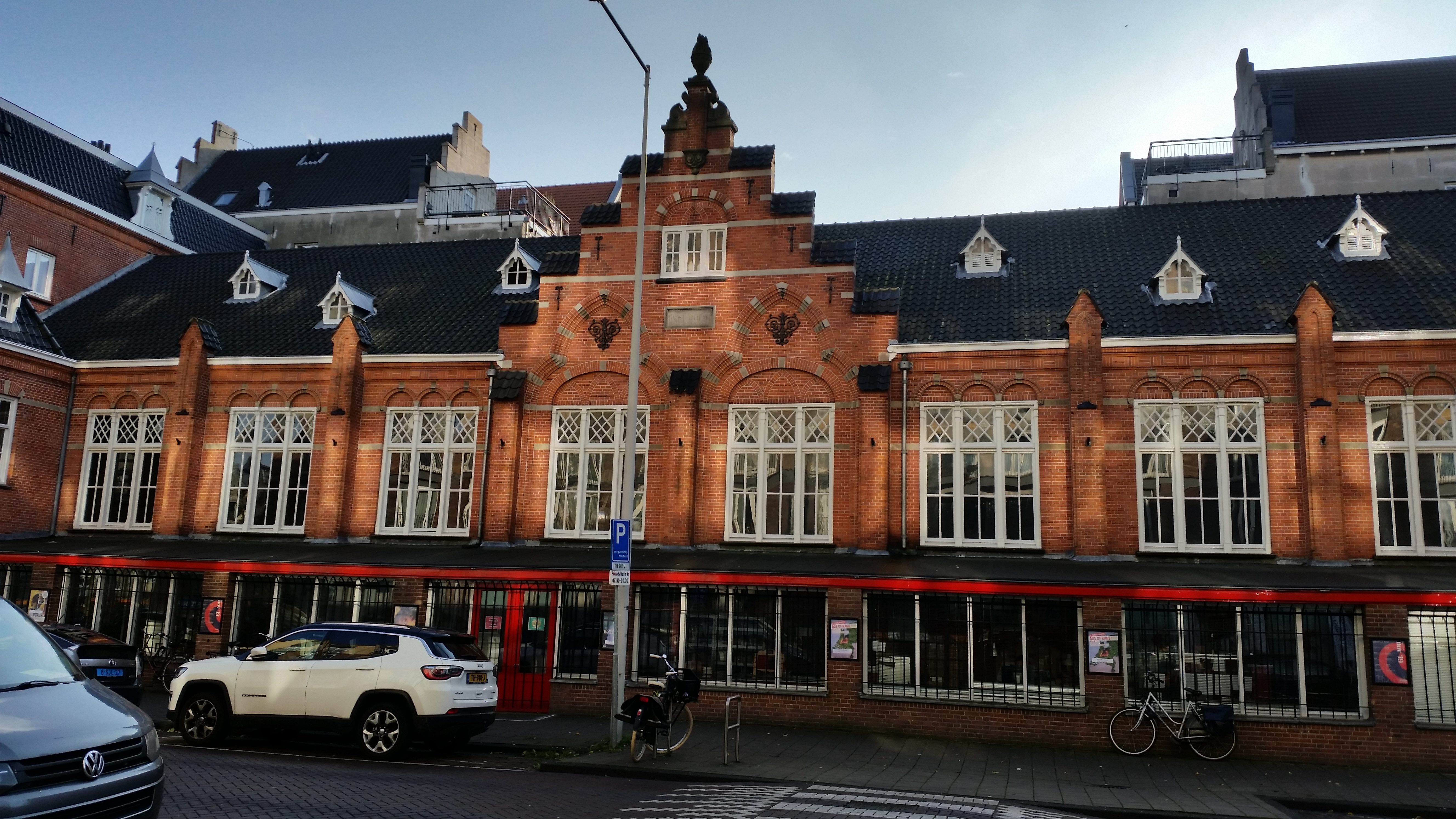 Middenbouw Nieuwe Passeerdersstraat 1, Amsterdam met voorgebouw van latere datum